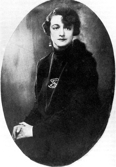 Елена Сергеевна Шиловская в 1928 году